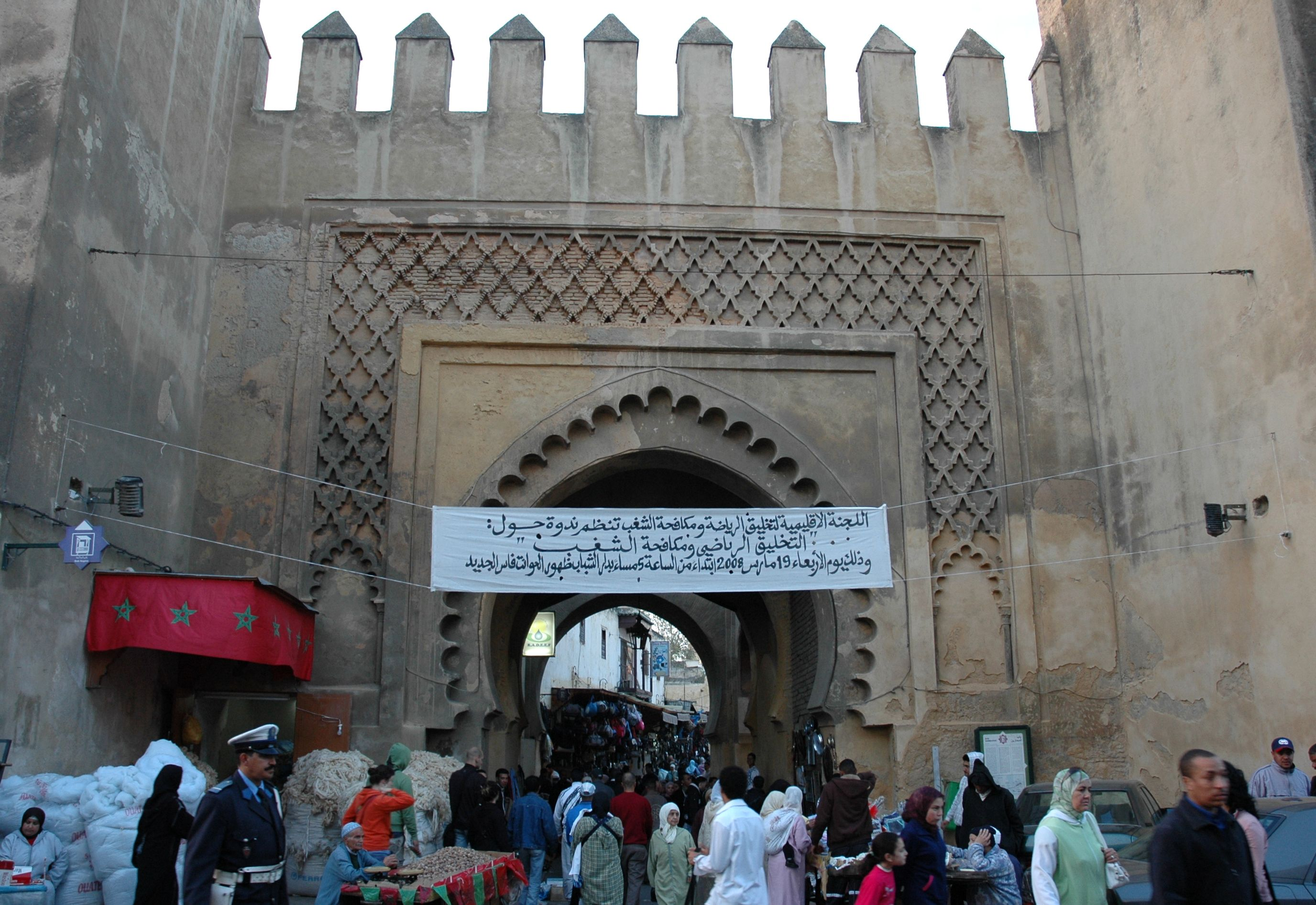 Fes el Jedid - Bab el-Semarine